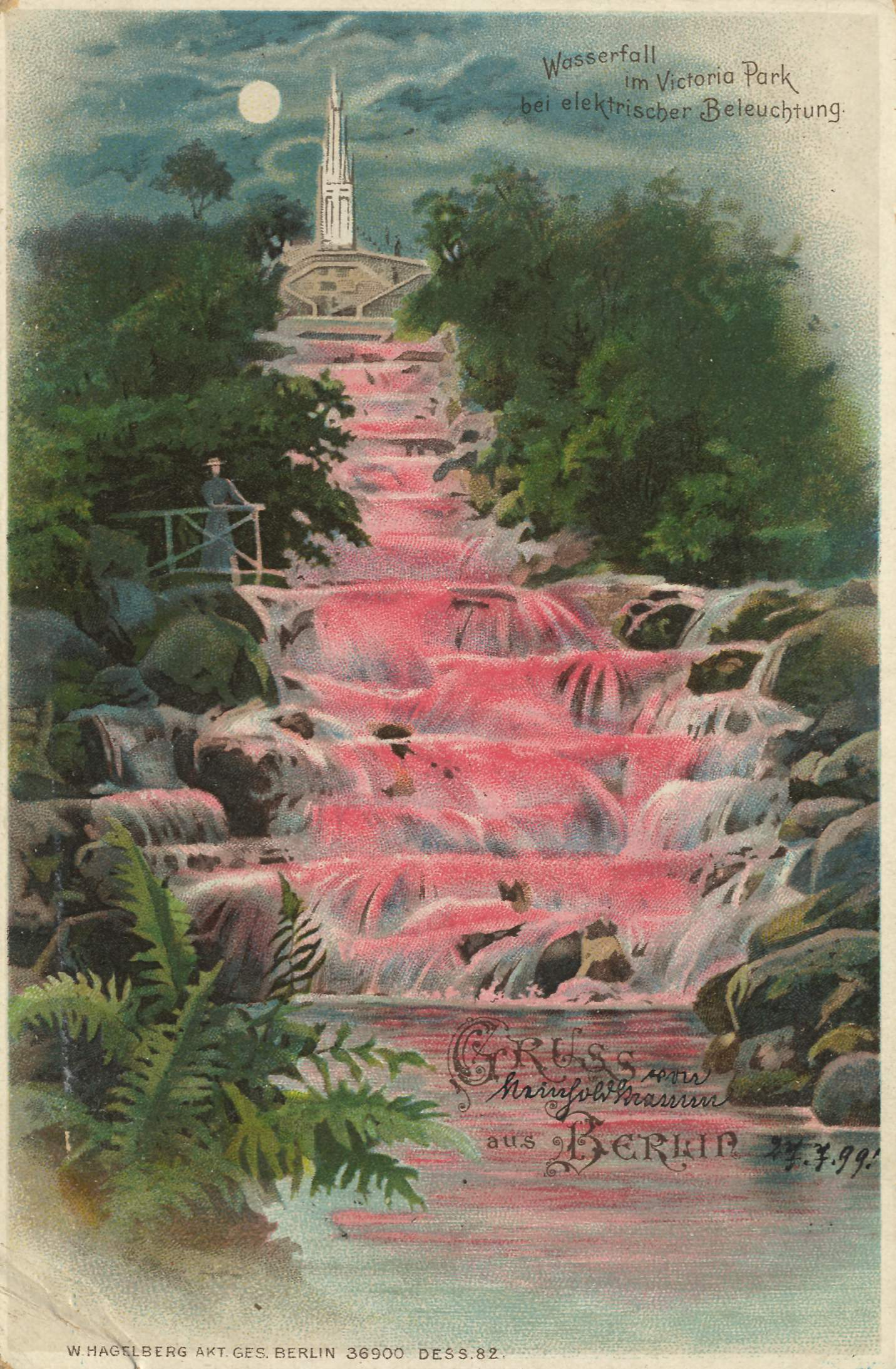 Wasserfall im Viktoriapark in Berlin-Kreuzberg